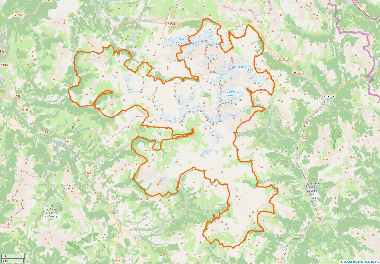 Périmètre du coeur de parc du Parc national des Écrins.